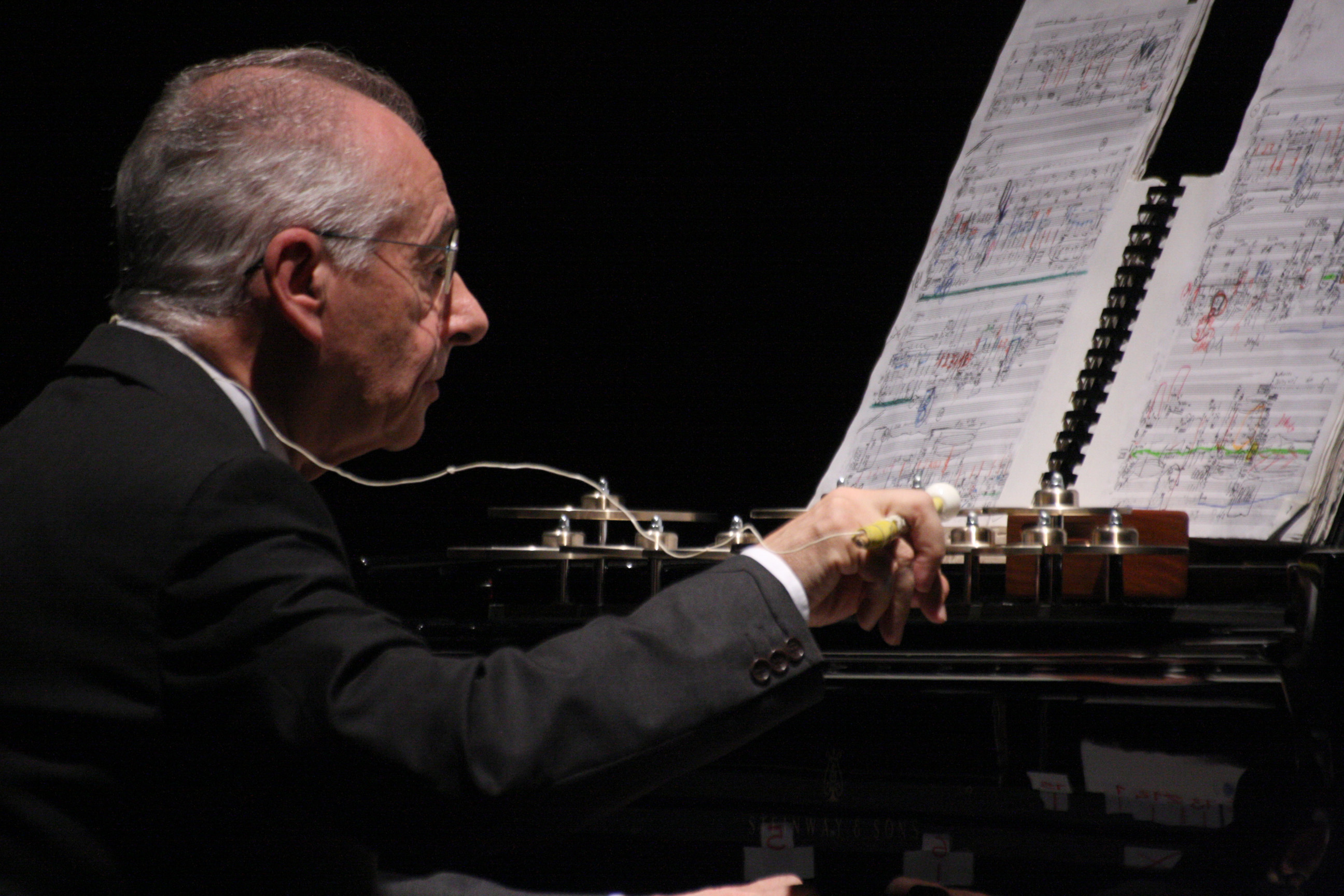 Torino 3 settembre 2008, Sala 500 Lingotto - Antonio Ballista